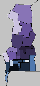 住居表示前の伊勢崎市の中心市街地。